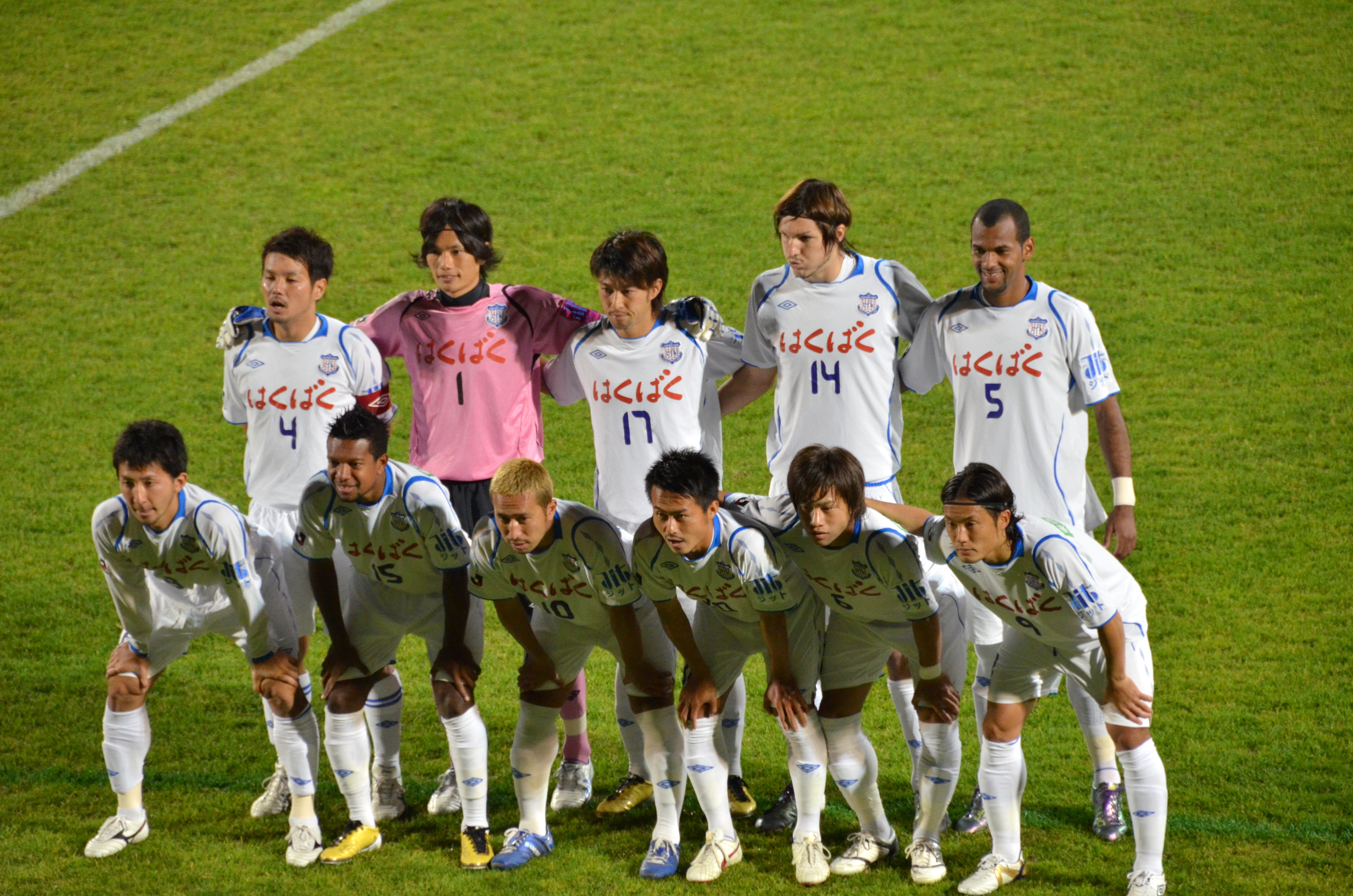 Ventforet Kofu - team DSC_1758